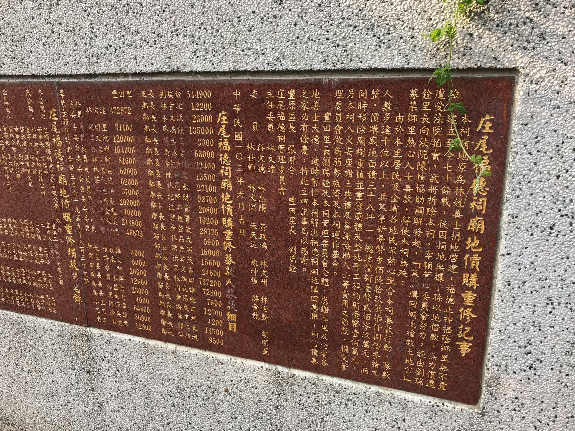 中文（台灣）: 庄尾福德祠廟地價購重修記事